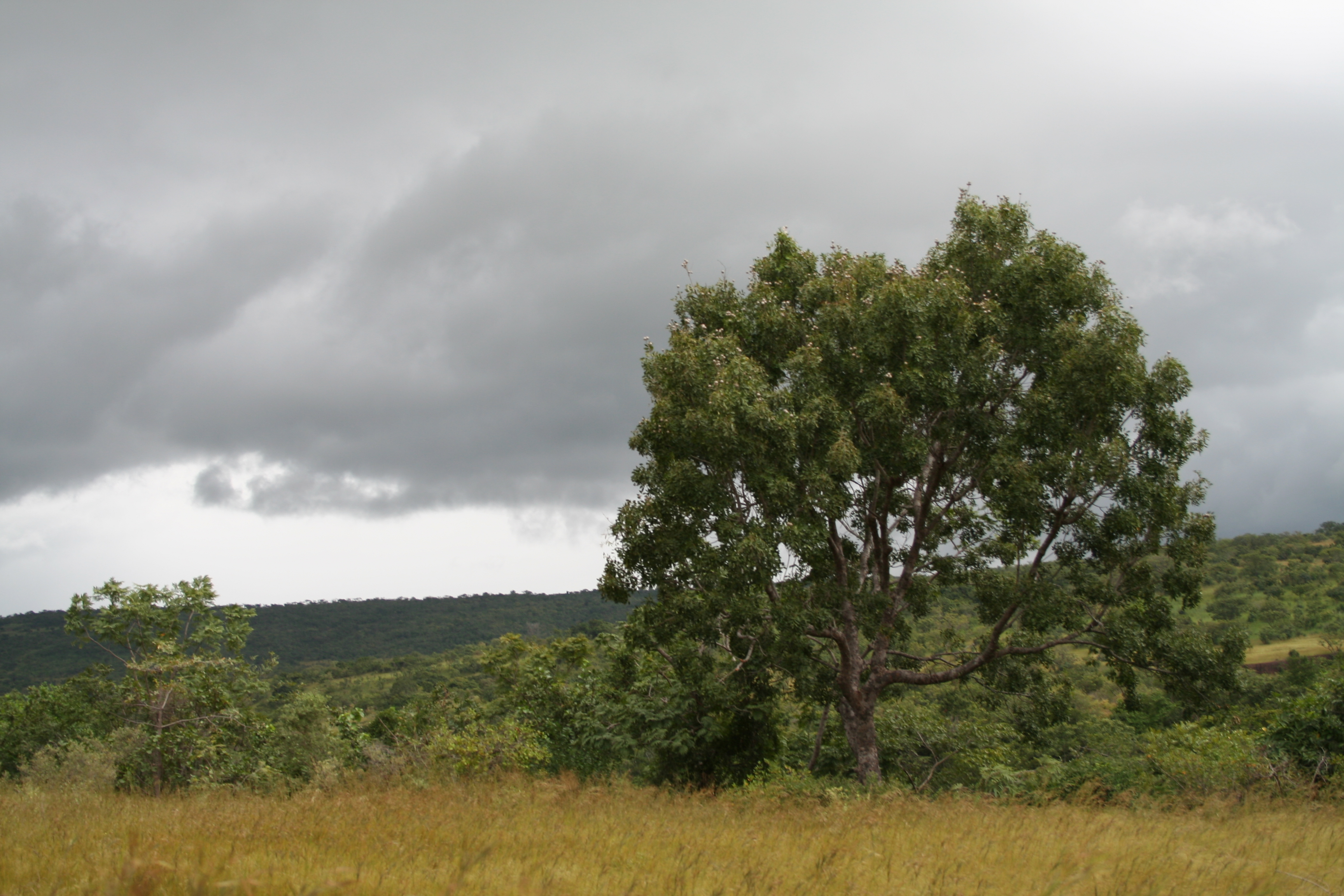 Khaya senegalensis near Mt. Tenakourou, Burkina Faso